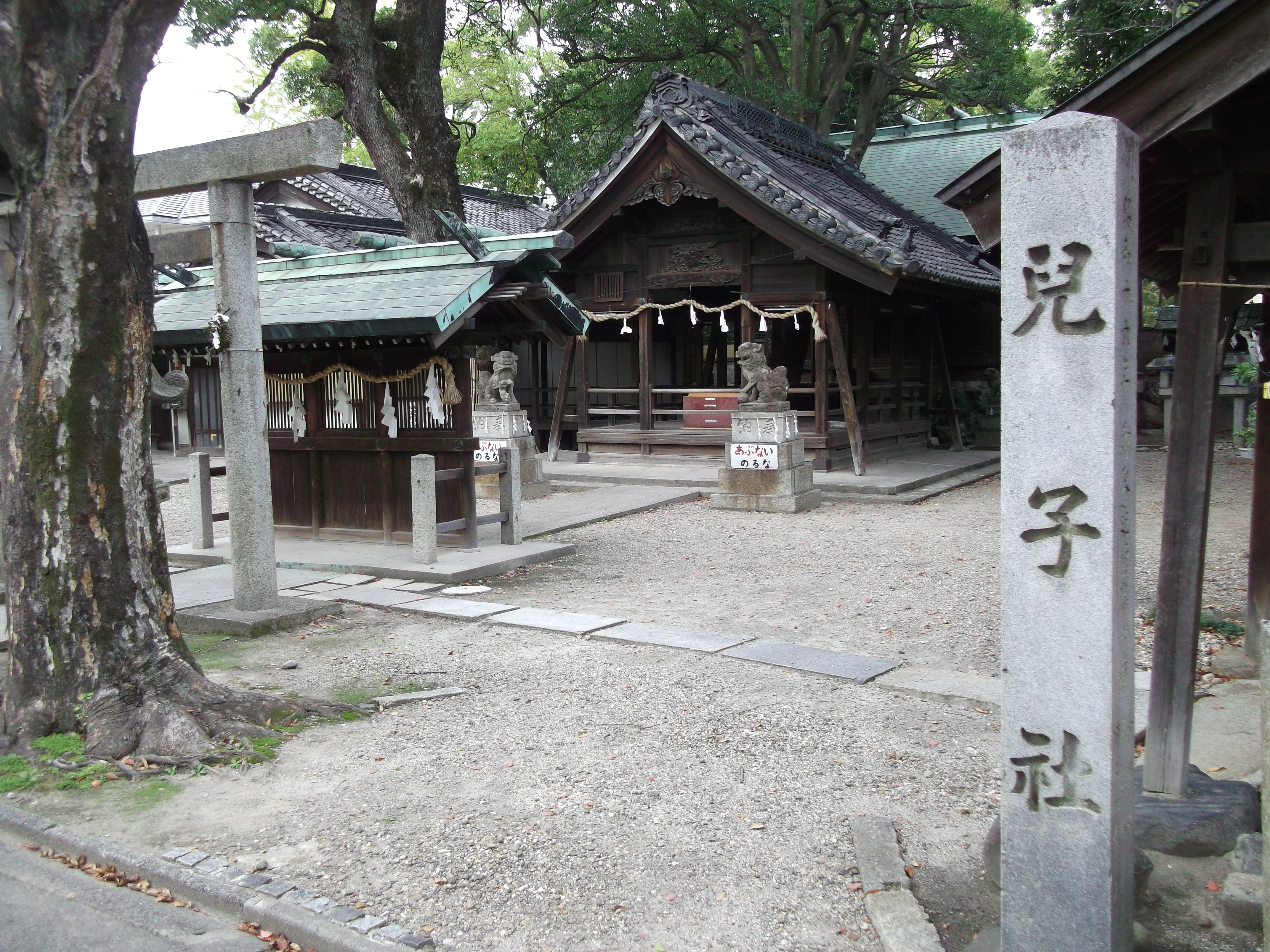 名古屋市北区志賀町にある児子八幡社を南側から写す